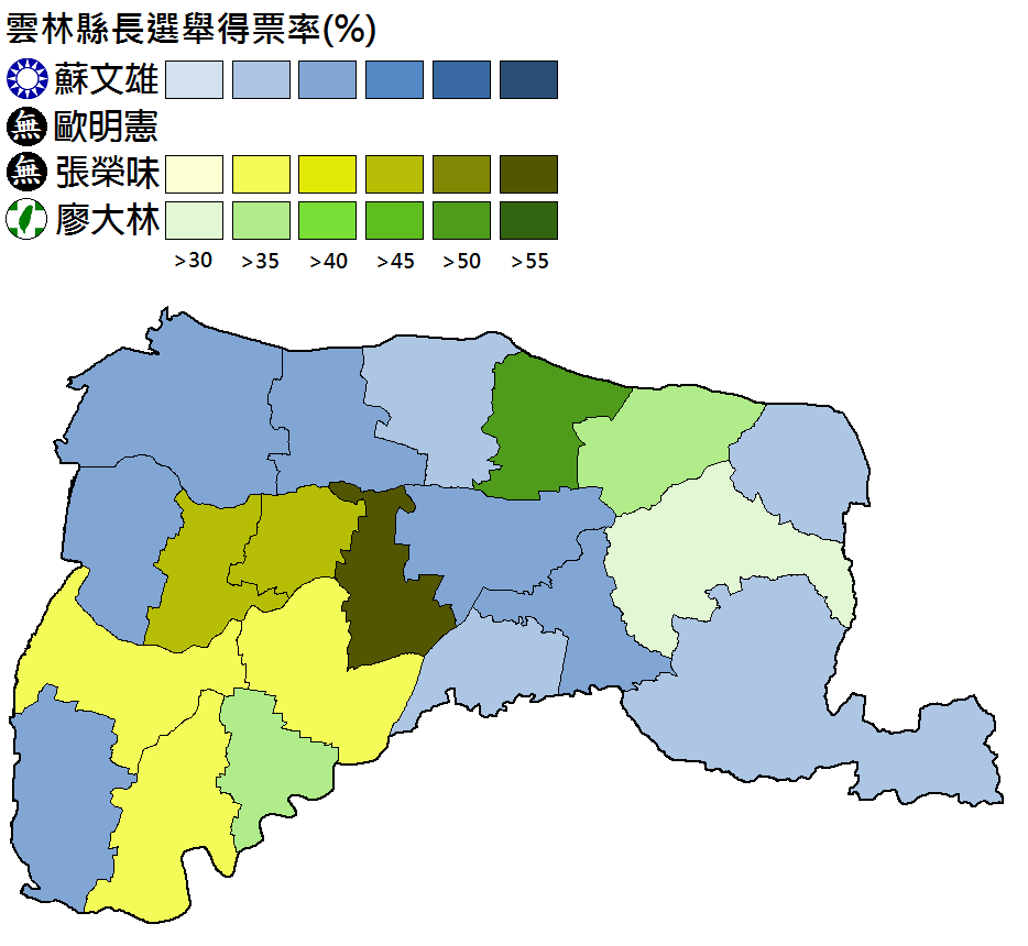 1997年雲林縣長選舉